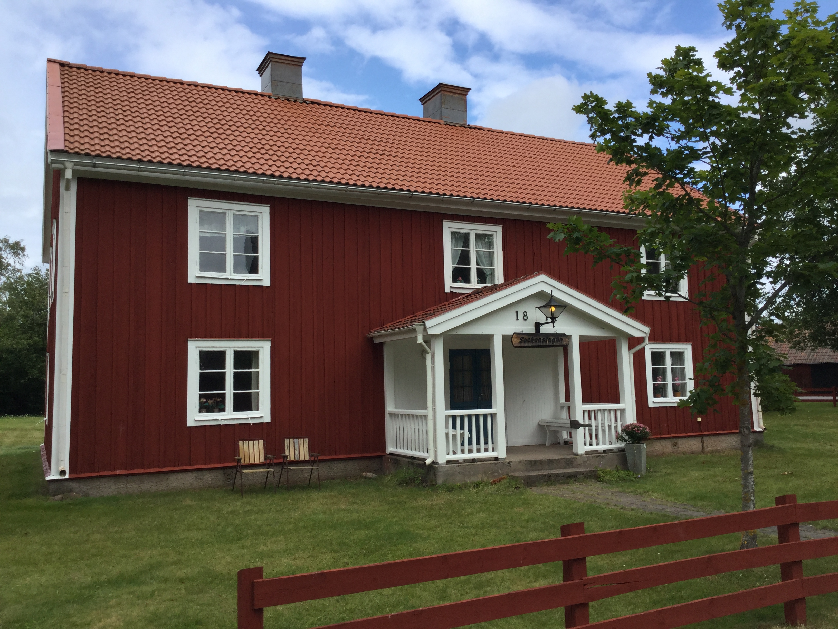 Sockenstugan i Ulrika, Linköpings kommun, Östergötlands län, söndag 2017-08-06.